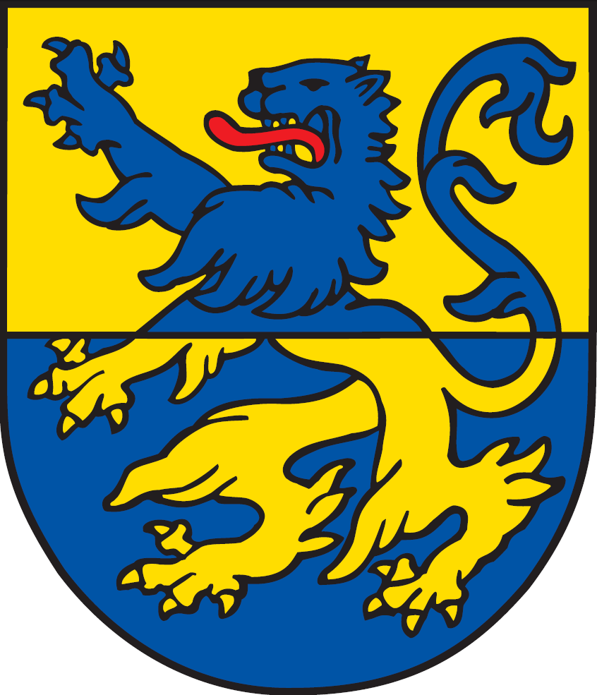 Wappen von Braunfels